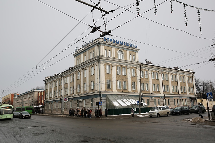 Магілёў. Строммашына